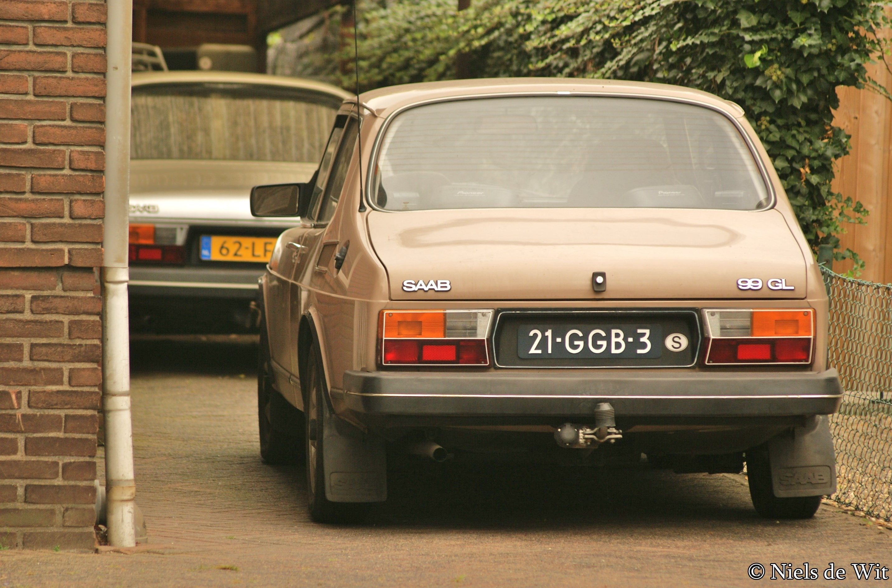 21-GGB-3